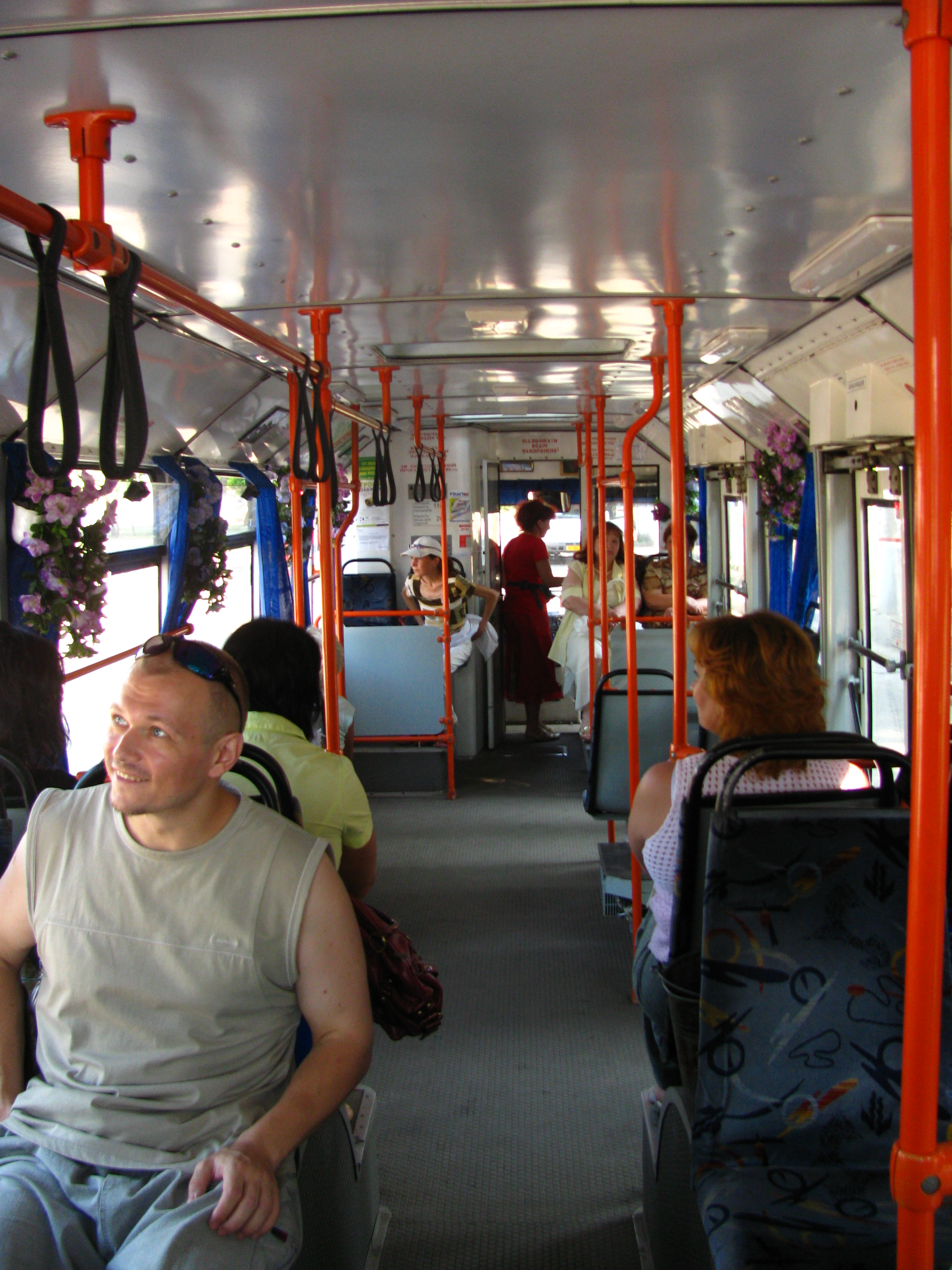 Салон троллейбуса ЮМЗ Е186